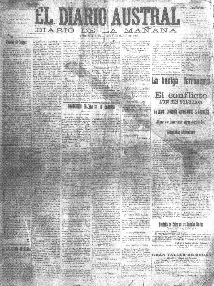 Portada del segundo número de El Diario Austral, 6 de marzo de 1916.